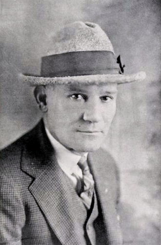 William Howard "Bud" Saunders